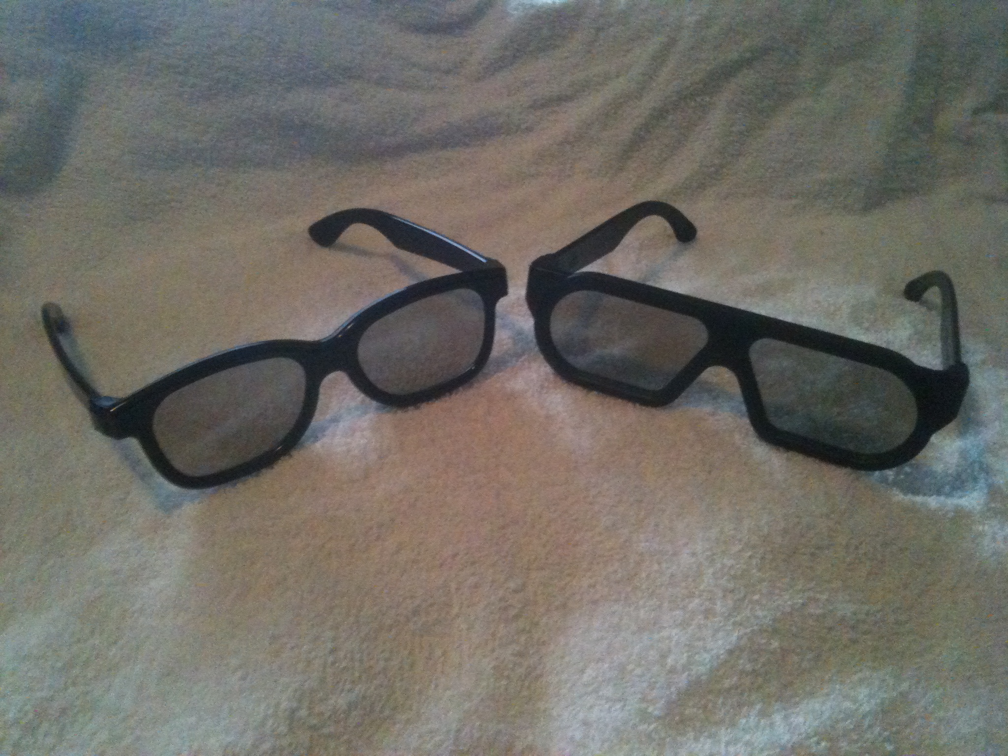 Lunettes 3D Des films Histoire de jouets 3 et Resident Evil : L’au-delà.